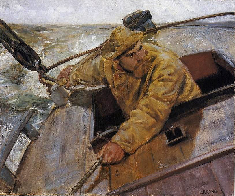 Hardt lelabel QS:Len,"Hardt le" label QS:Lnb,"Hardt le"